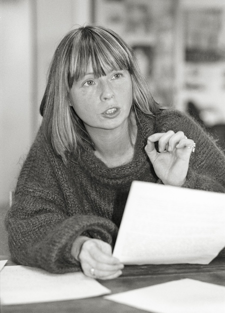 Dagmar Pelzer, Abgeordnete der Hamburgischen Bürgerschaft